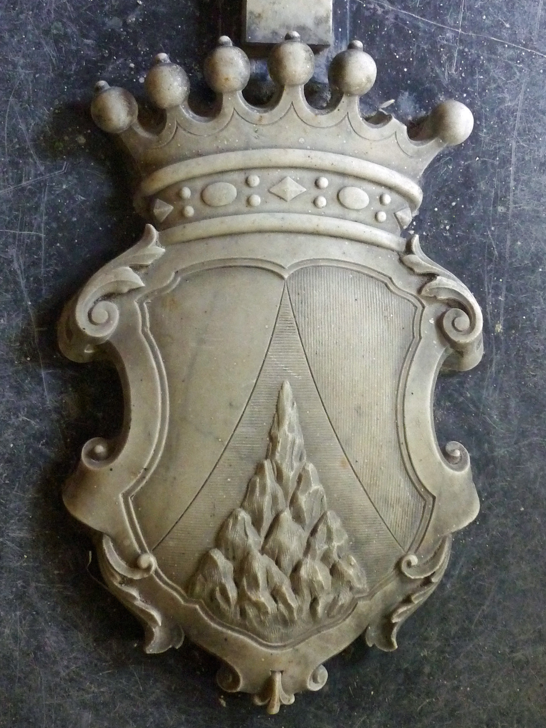 Wappen der Freiherren von Zessner-Spitzenberg (seit 1768) auf der Grabplatte des Vinzenz Freiherr von Zessner-Spitzenberg (1799–1879) in der Familiengruft der Pfarrkirche St. Martin in Liebeschitz